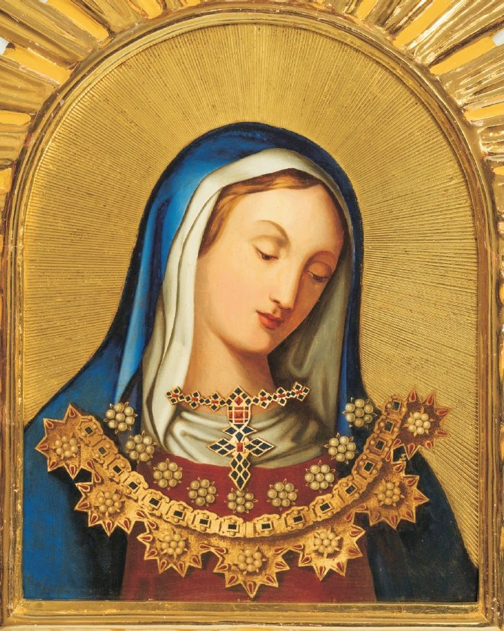 Panna Maria Milotická, olejomalba, 1839, autor Tomáš Mařík, foto: František Sysel